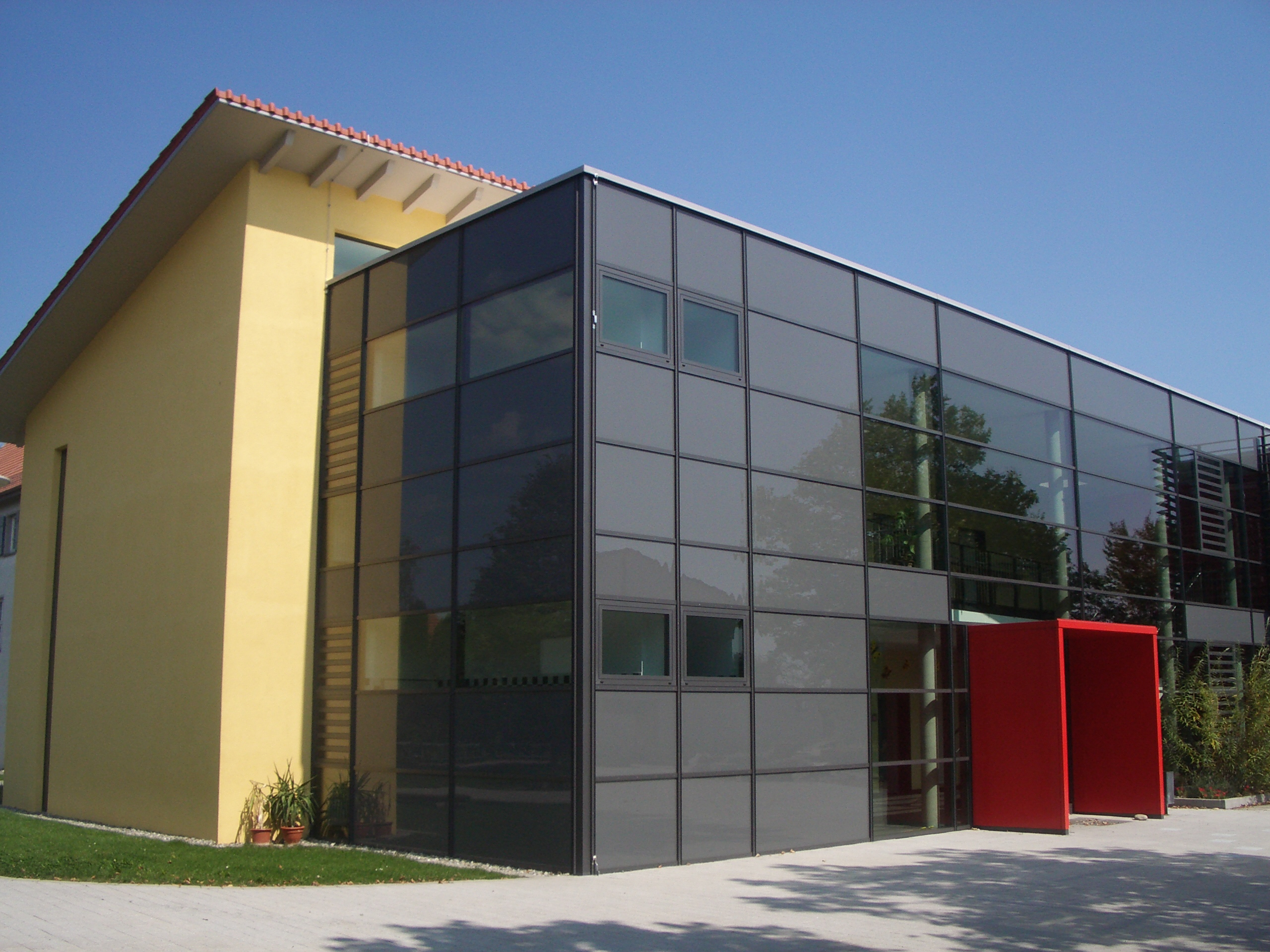 Horgenzell, Germany: Erweiterungsbau der Grund- und Hauptschule, 2005